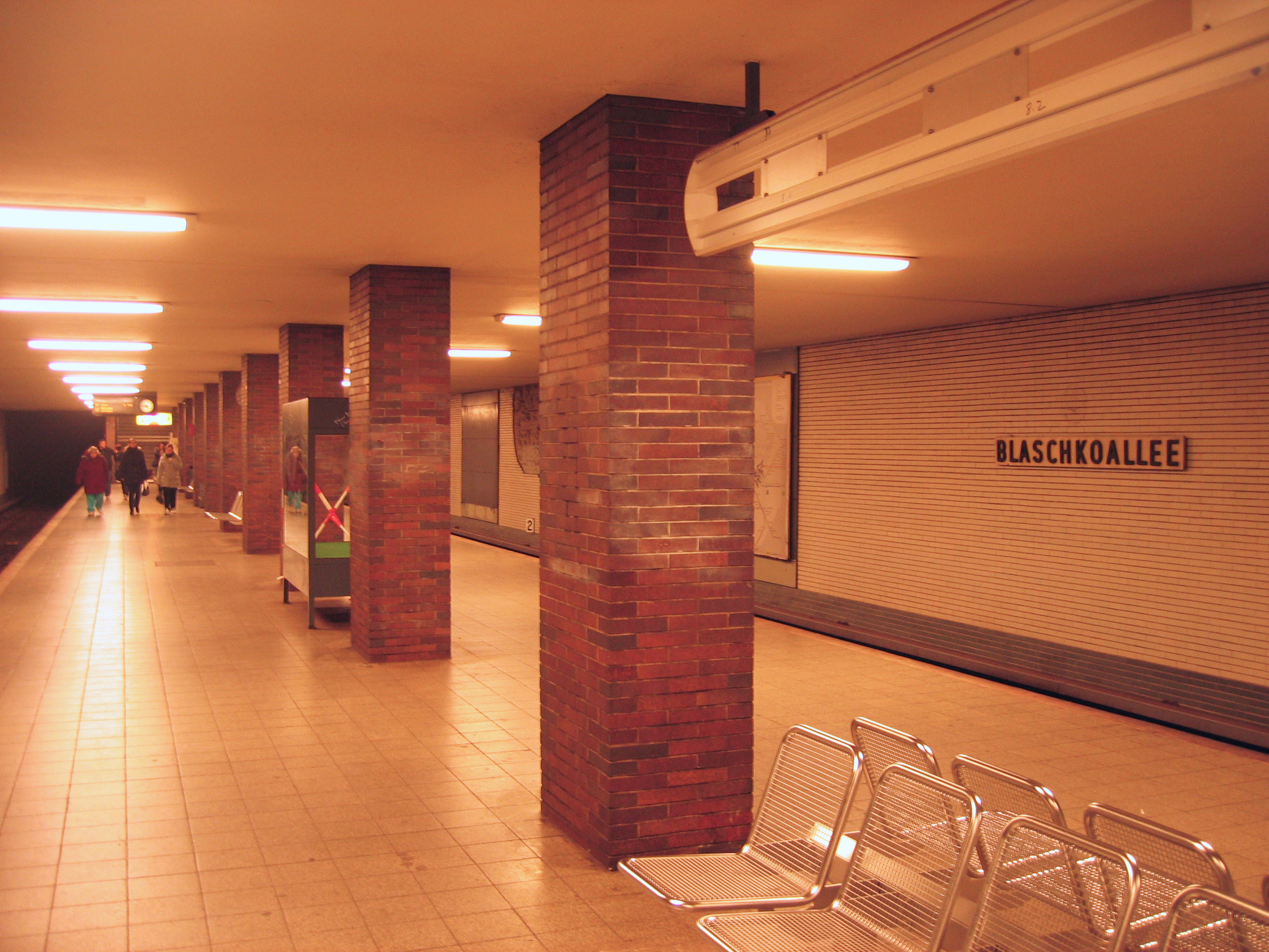 U-Bahnhof Blaschkoallee, Berlin